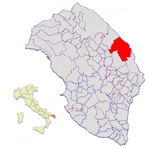 Il territorio di Melendugno nella provincia di Lecce